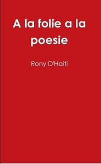 A la folie a la poesie de Rony D'Haiti